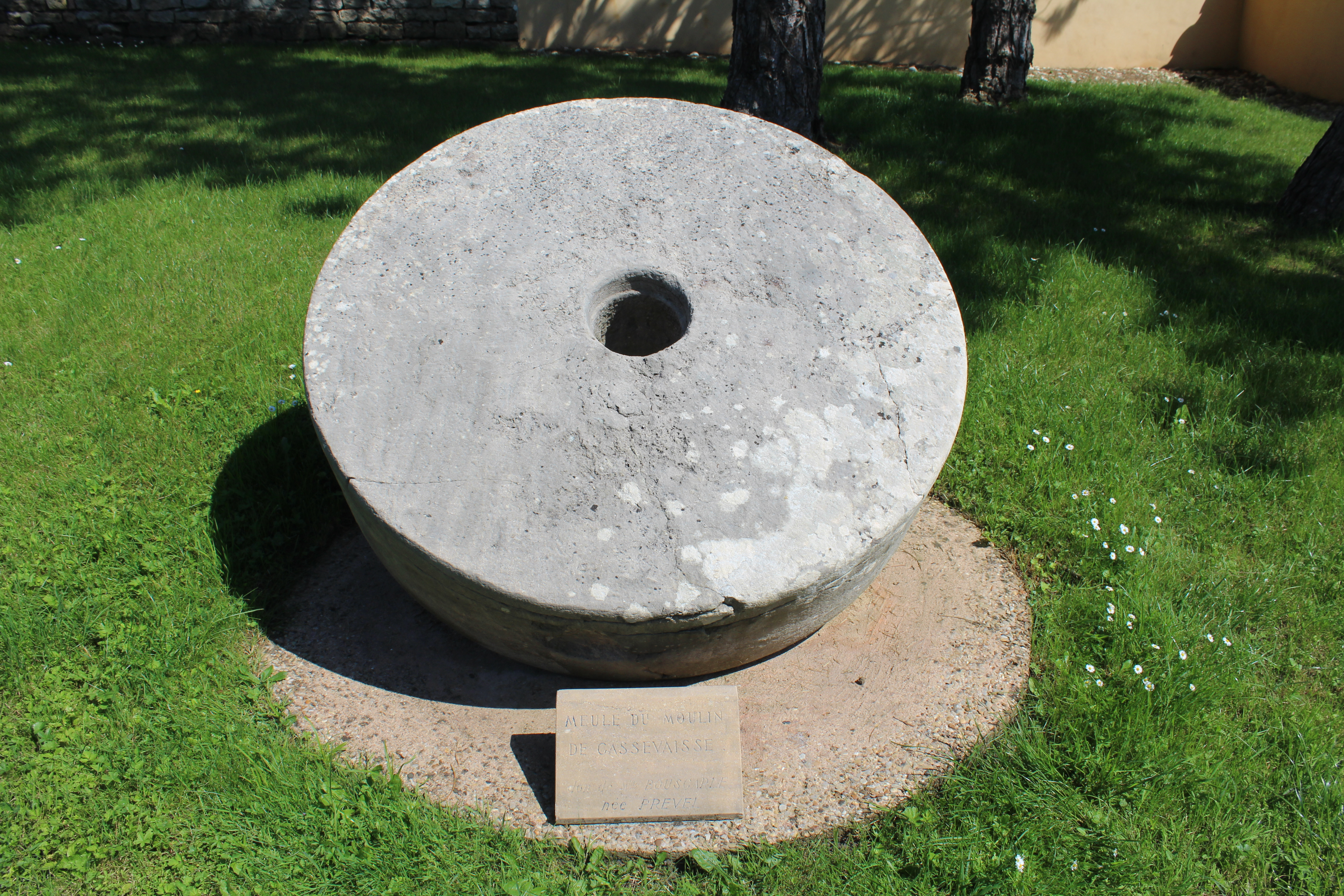 Ancienne meule du moulin de Cassevesce à Saint-Cyr-sur-Menthon.